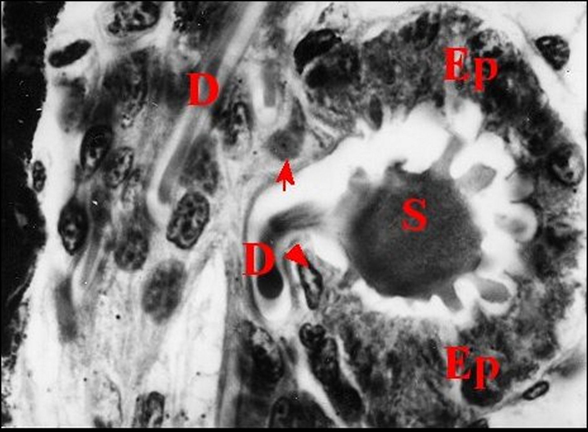 Collet d' une glande prégonoporale d' Araneus quadratus, coupe histologique